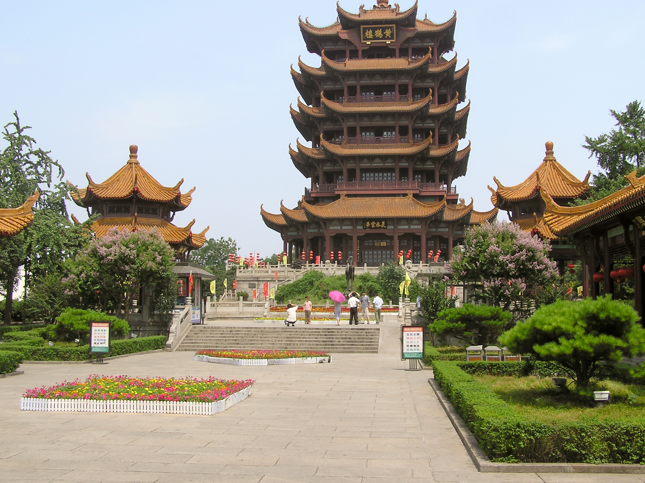 Pagode de la Grue Jaune - Wuhan (Chine) - Vue générale